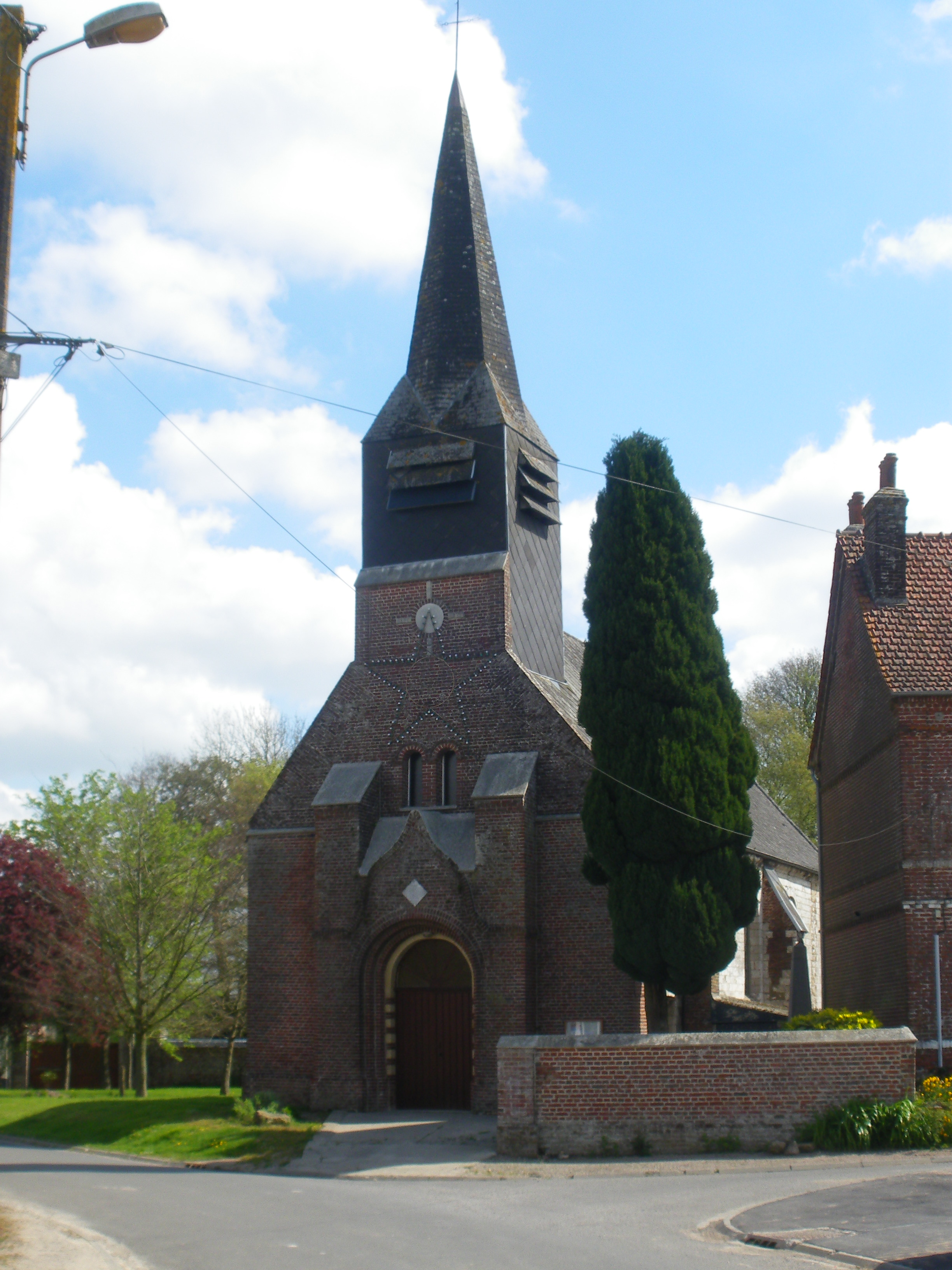 Vue de l'église Saint-Vaast d'Ivergny.